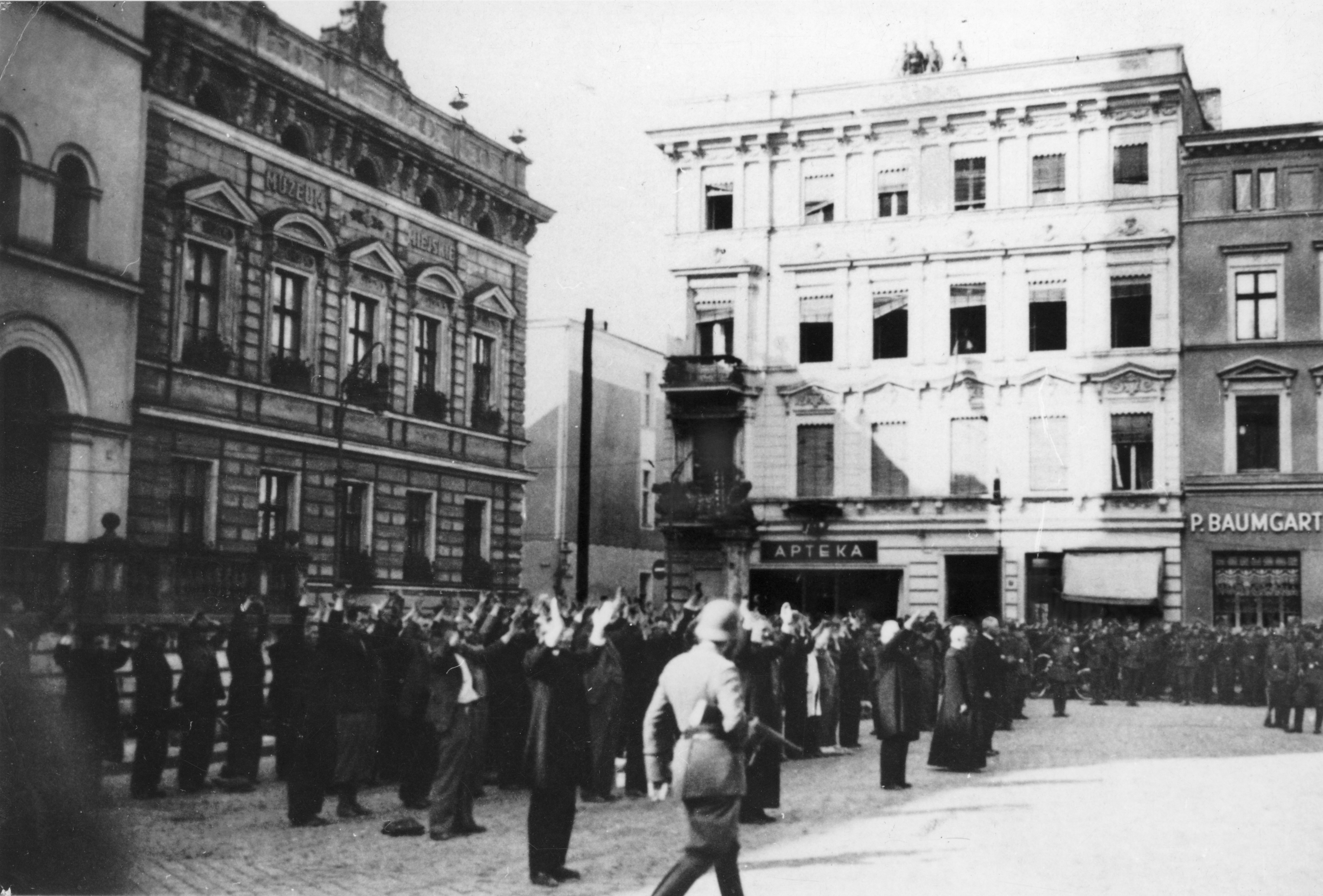 Polscy zakładnicy, w tym bydgoscy księża, zgromadzeni przez władze hitlerowskie na Starym Rynku w Bydgoszczy w czasie publicznych egzekucji w dniu 9 IX 1939 Komentarz: Bydgoszcz jesienią 1939 r. była miejscem niezwykle tragicznych wydarzeń dla polskich mieszkańców miasta. Po wkroczeniu 5 IX 1939 wojsk niemieckich rozpoczęła się akcja pacyfikacyjna obejmująca wszystkie kręgi ludności polskiej. Do 11 września, według głównodowodzącego niemieckiej 4 armii, internowano 1050 osób, zastrzelono 370 „party-zantów”, a w dniach 9 i 10 września 1939 w publicznej egzekucji na Starym Rynku roz-strzelano 20 polskich zakładników. Publiczne egzekucje zostały udokumentowane przez niemieckich fotografów do celów propagandowych. Nie wszystkie osoby na fotografiach udało się rozpoznać. Widać na nich bydgoskich księży, urzędników. Niektóre zdjęcia przed-stawiające moment egzekucji były wykorzystywane przez propagandę hitlerowską jako do-kumentujące działania polskie w dniu 3 września, podczas zwalczania niemieckiej dywersji. Wydarzenie udokumentowane na fotografii pochodzi z pierwszych dni aresztowań i masowych rozstrzeliwań. Obecnie szacuje się, że do listopada 1939 r. śmierć poniosło około 1500 osób. Specjalne akcje organizowano przeciwko nauczycielom, urzędnikom i innym przedstawicielom polskiej inteligencji. Kilkaset osób zginęło z mocy wyroków hitlerow-skiego Sądu Specjalnego w Bydgoszczy. Obecnie oblicza się, iż w wyniku eksterminacji bezpośredniej i pośredniej stosowanej przez okupanta hitlerowskiego śmierć poniosło 5300 polskich bydgoszczan. Ofiarą hitlerowców było także przeszło 2 tysiące bydgoskich Żydów. Opis zewnętrzny: kopia fotografii, czarno- biała, 18x 24 cm Miejsce przechowywania: APB, Akta Okręgowej Komisji Badania Zbrodni Hitlerowskich w Bydgoszczy, sygn. 1003 Autor komentarza: Stanisław Błażejewski Autor skanu: Bolesław Rassalski